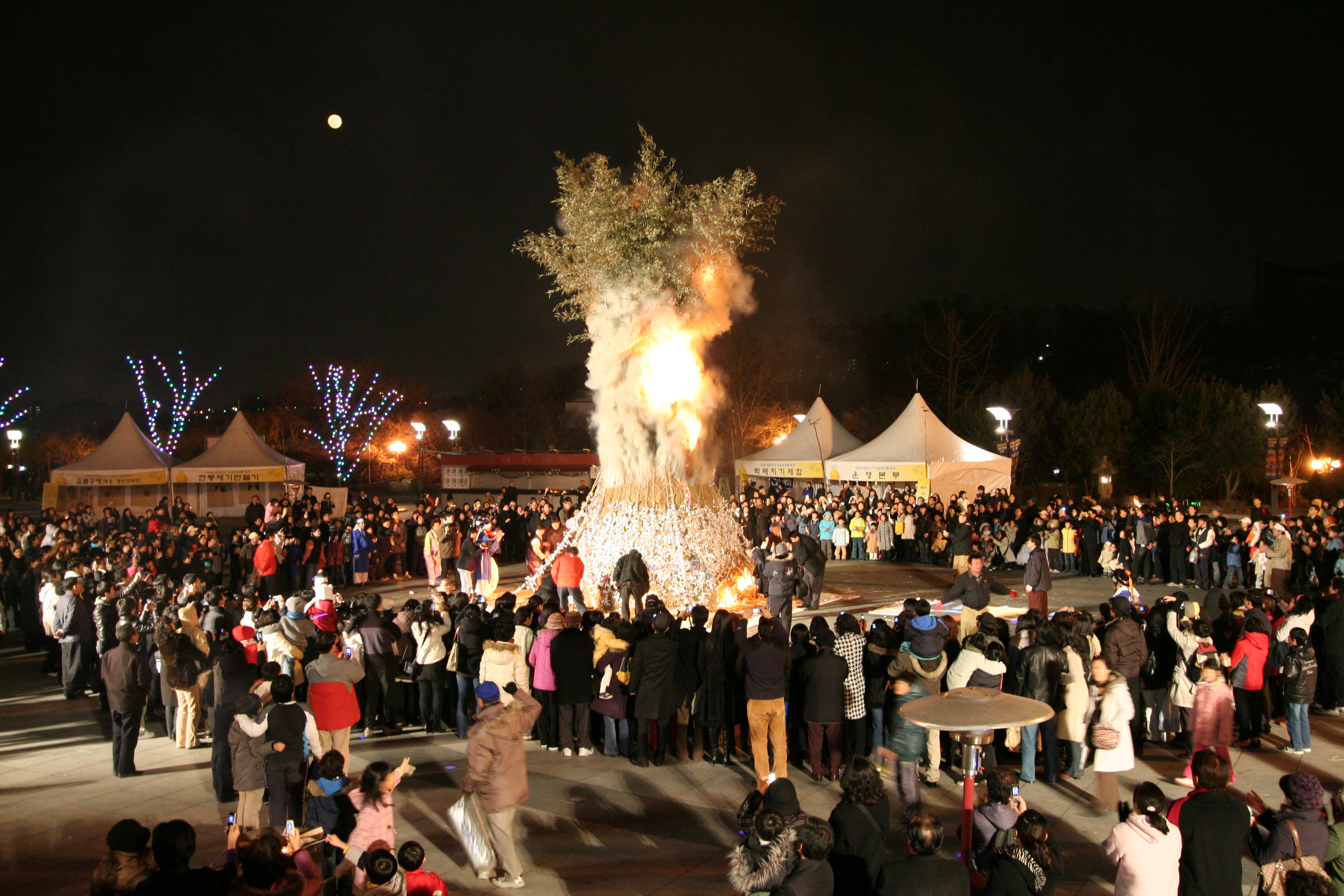 Korea, Daeboreumnal-Full Moon Festival